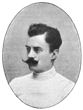 Luigi Barbasetti, italienischer Fechter